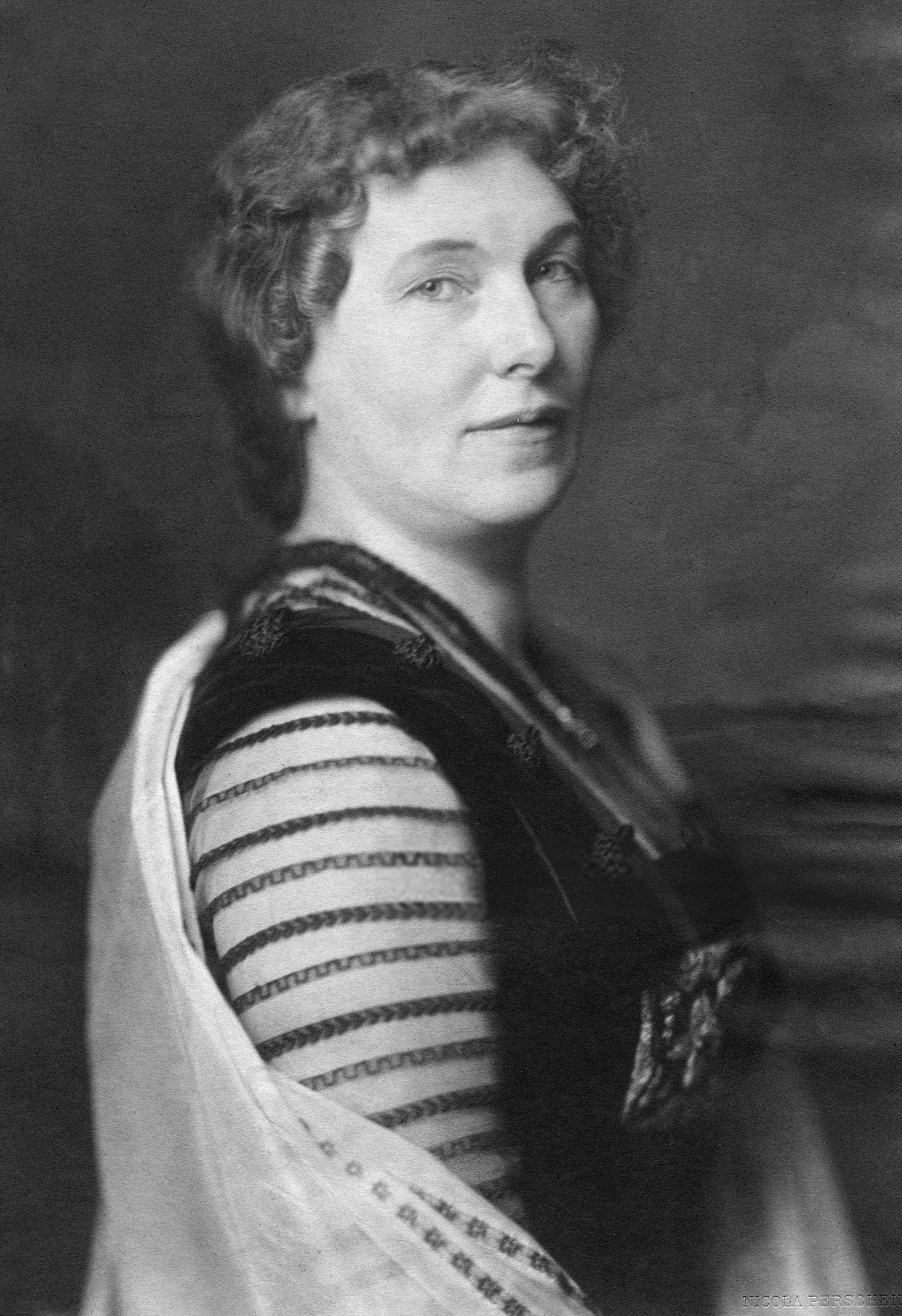 Lichtbild von Clara Viebig in Berlin